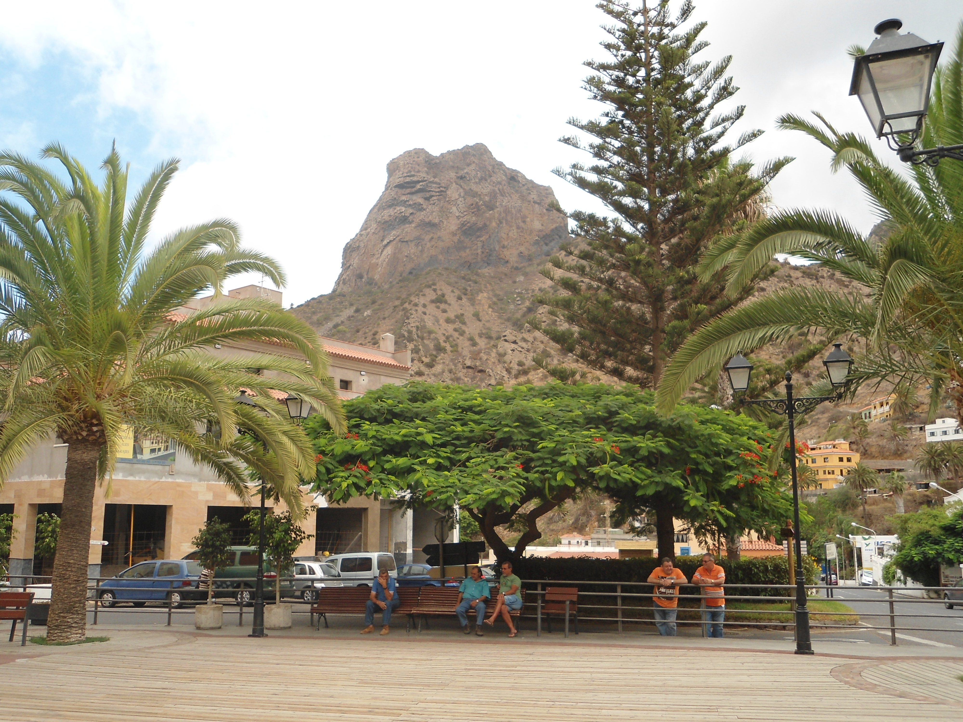 Zicht op een deel van Vallehermoso en Roque Cano